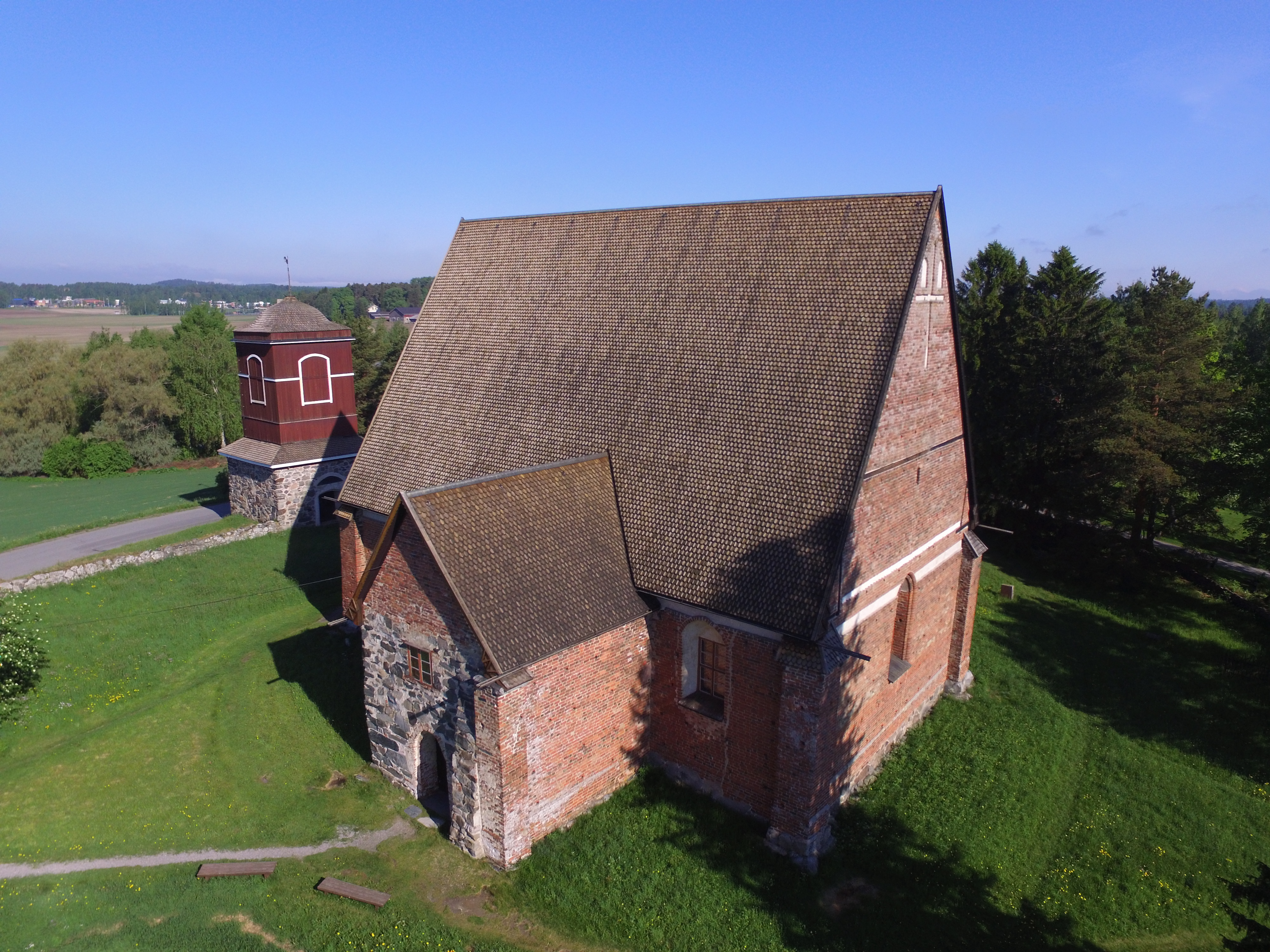 Pyhän Ristin kirkko Hattulassa, Kanta-Hämeessä